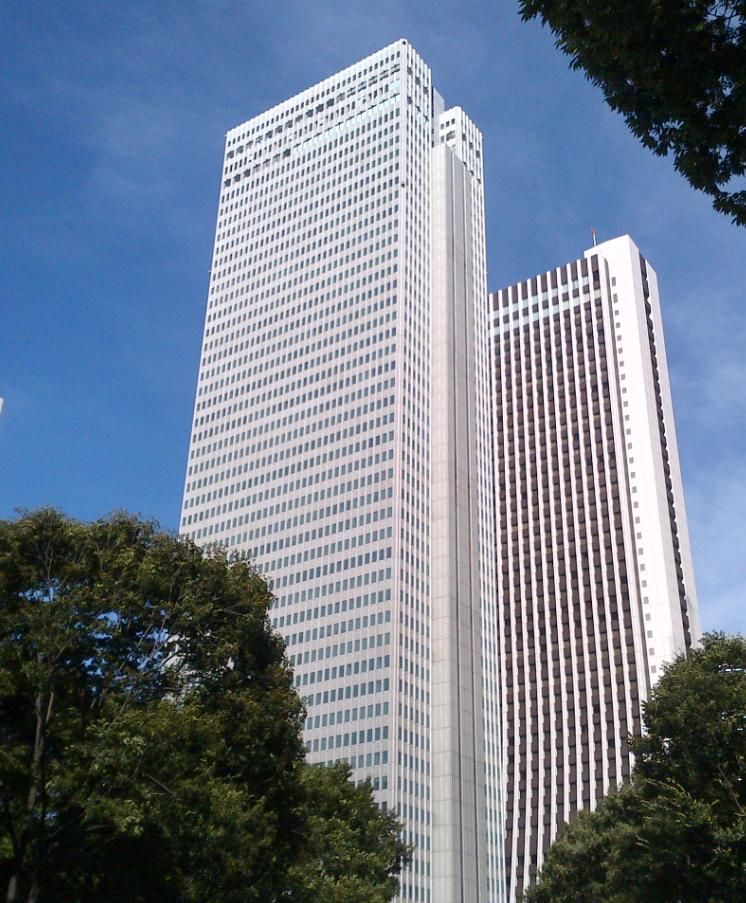 キャレオの入居する新宿野村ビル